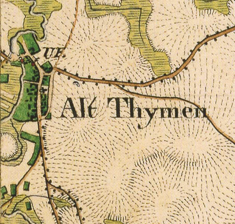 Alttymen, OT von Fürstenberg/Havel, Lkr. Oberhavel, Brandenburg, Ausschnitt aus dem Urmesstischblatt Blatt 2745 Lychen von 1825